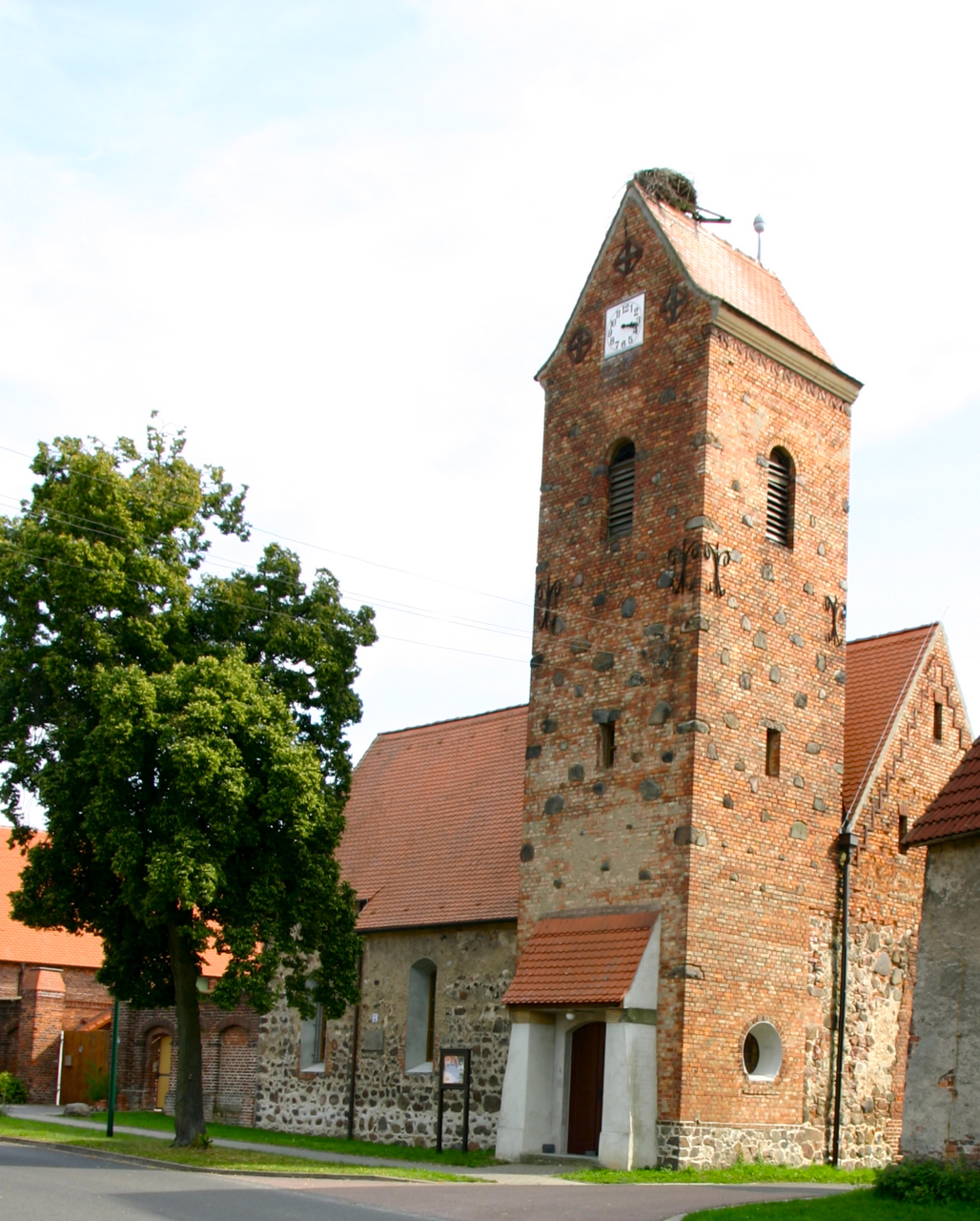 Libbesdorf ist ein Ortsteil der Gemeinde Osternienburger Land im Landkreis Anhalt-Bitterfeld in Sachsen-Anhalt.